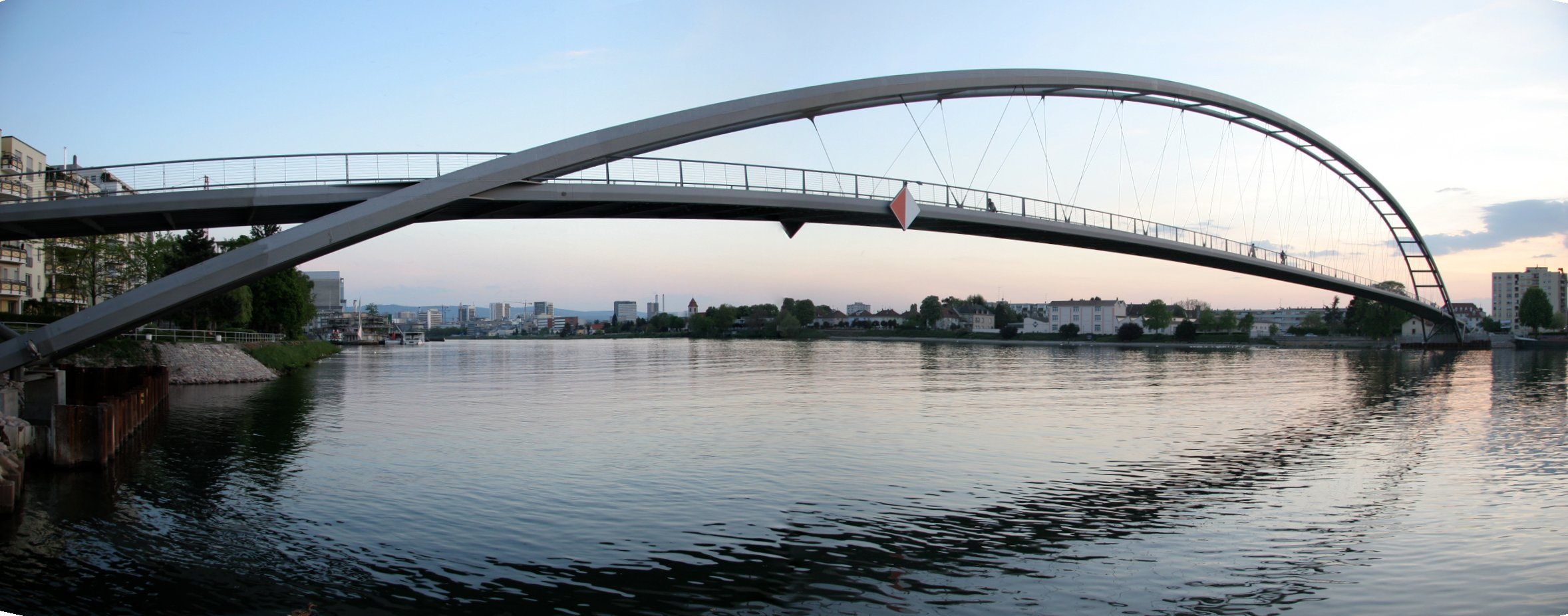 Dreiländerbrücke über den Rhein Passerelle des Trois Pays au dessus du Rhin "Tthree countries footbridge" over the Rhine